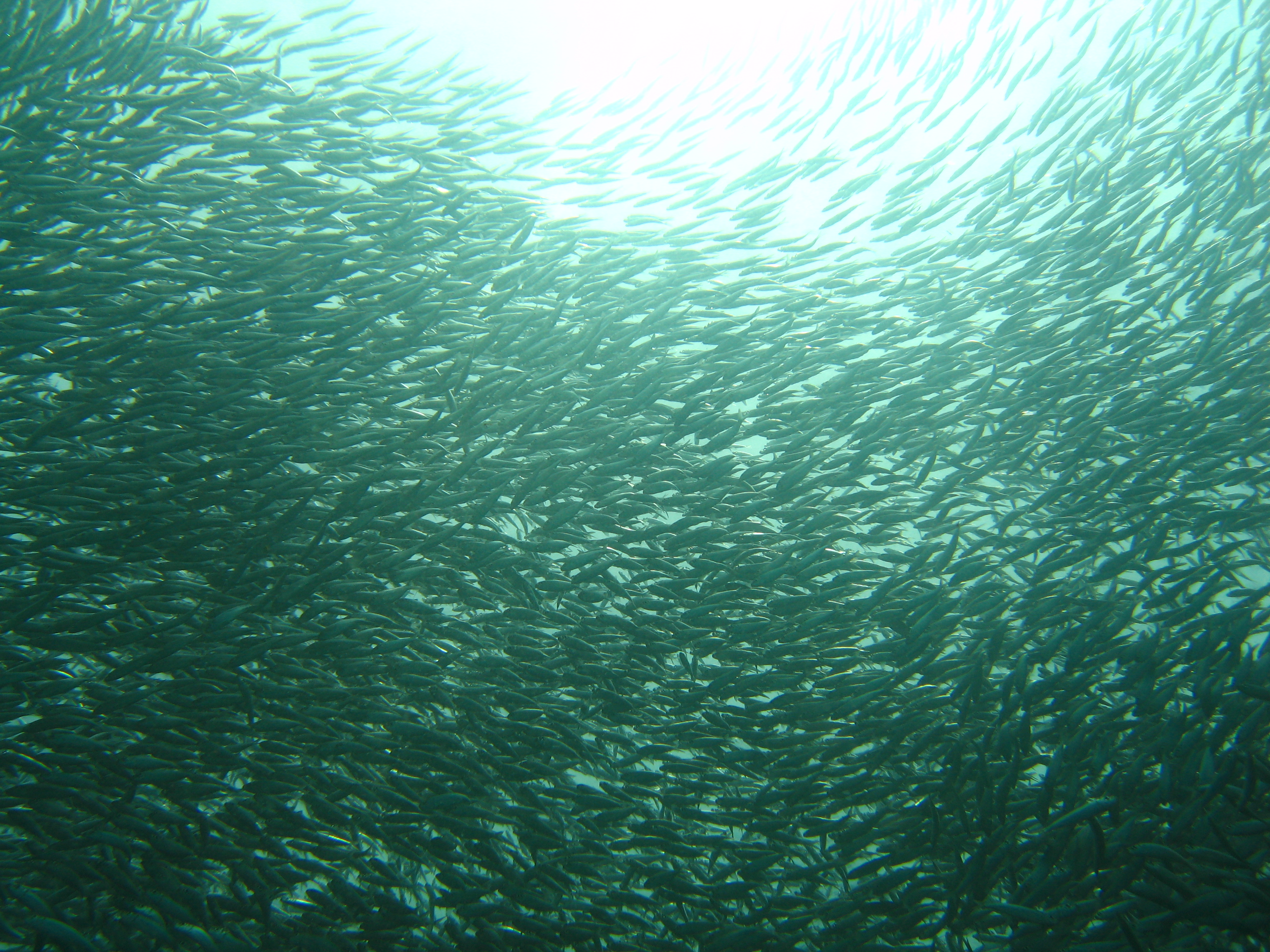 Mactan Cebu, Philippines フィリピン、セブ州マクタン島 VIDEO